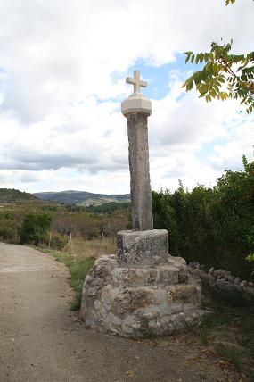 Piló de la Santanica (Sucaina, Alt Millars, Castelló)